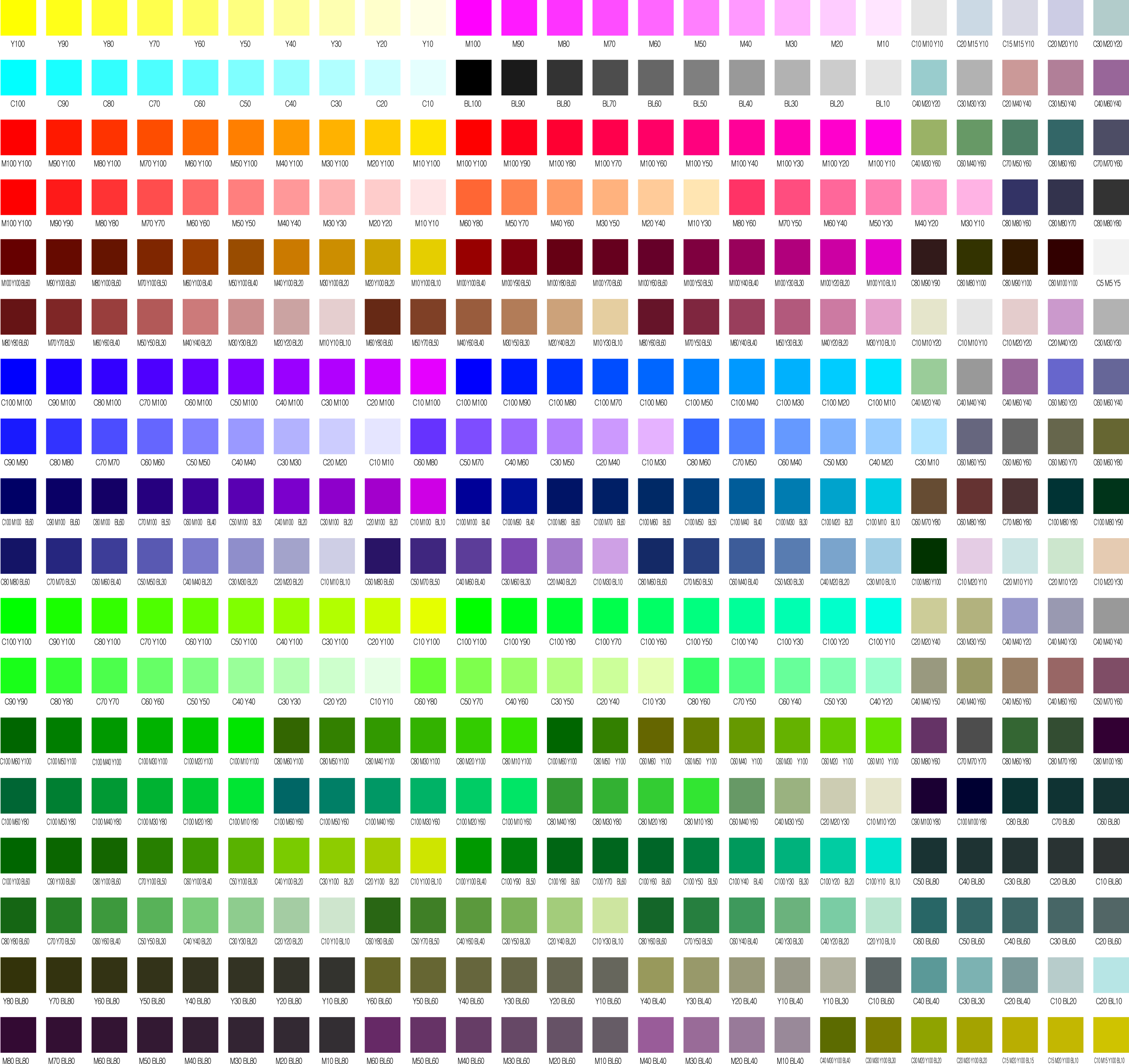 CMYK Color Chart